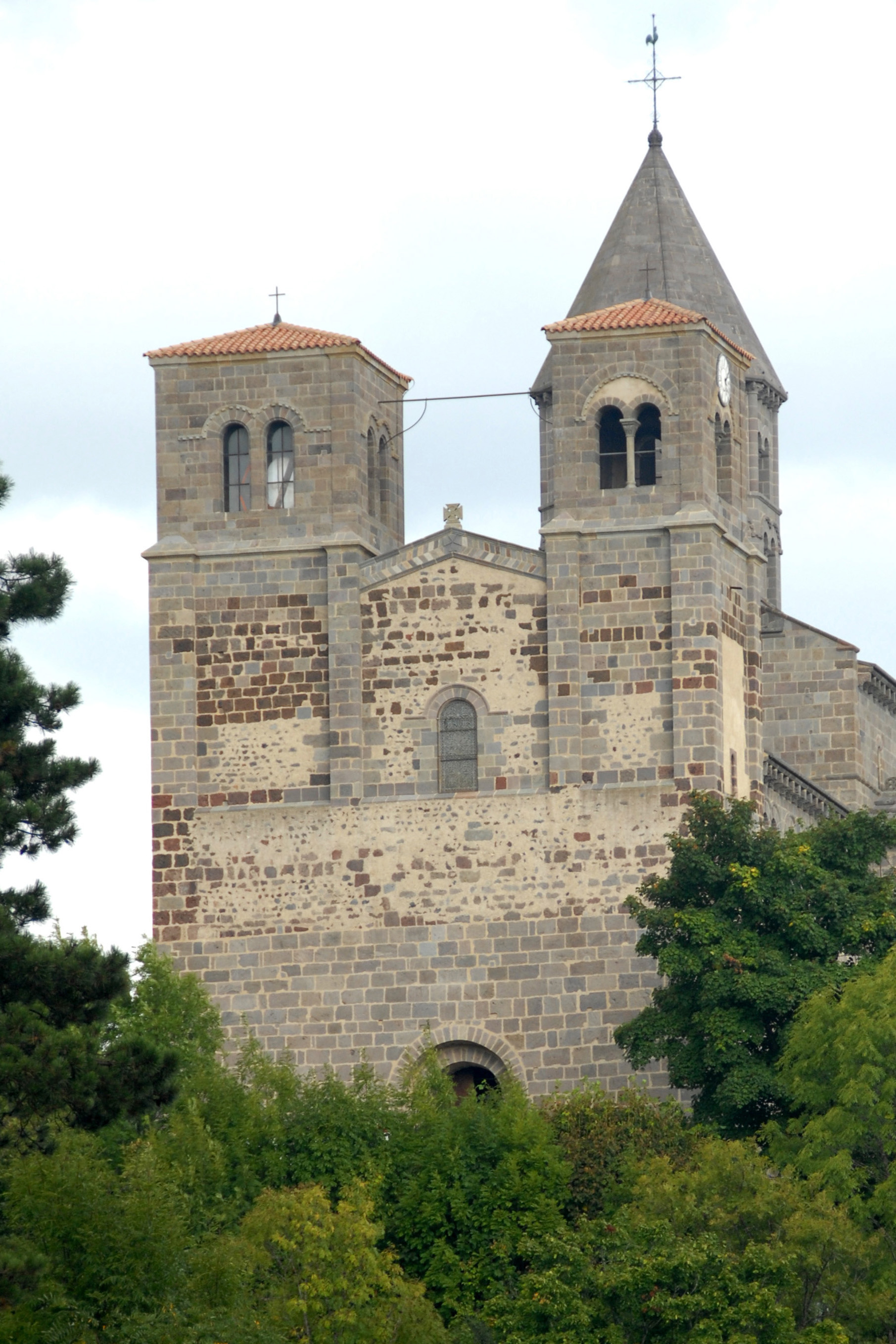 St.-Nectaire, Westwerk / "Fassade", von SW